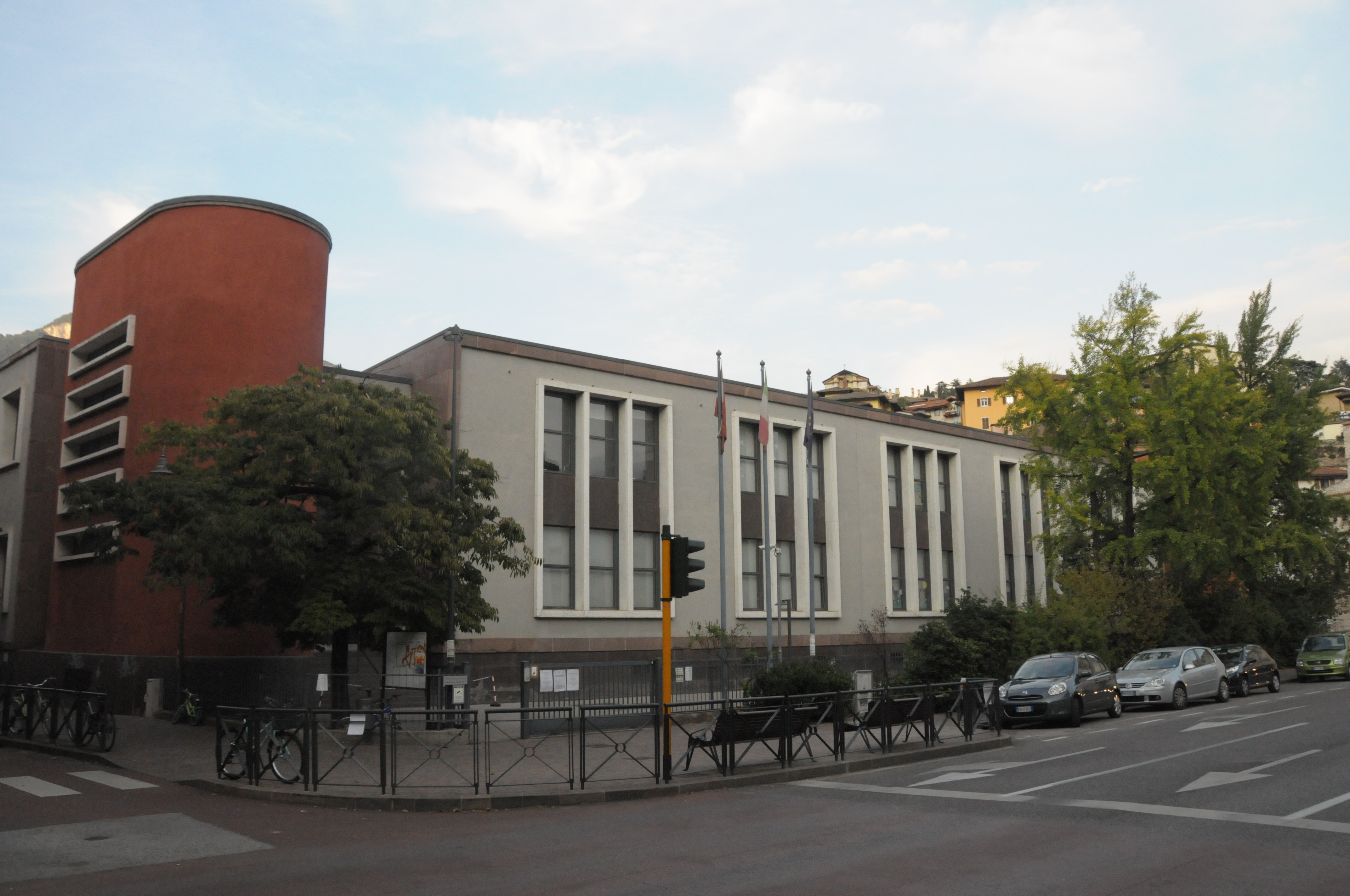 Scuola primaria “Raffaello Sanzio” This is a photo of a monument which is part of cultural heritage of Italy.